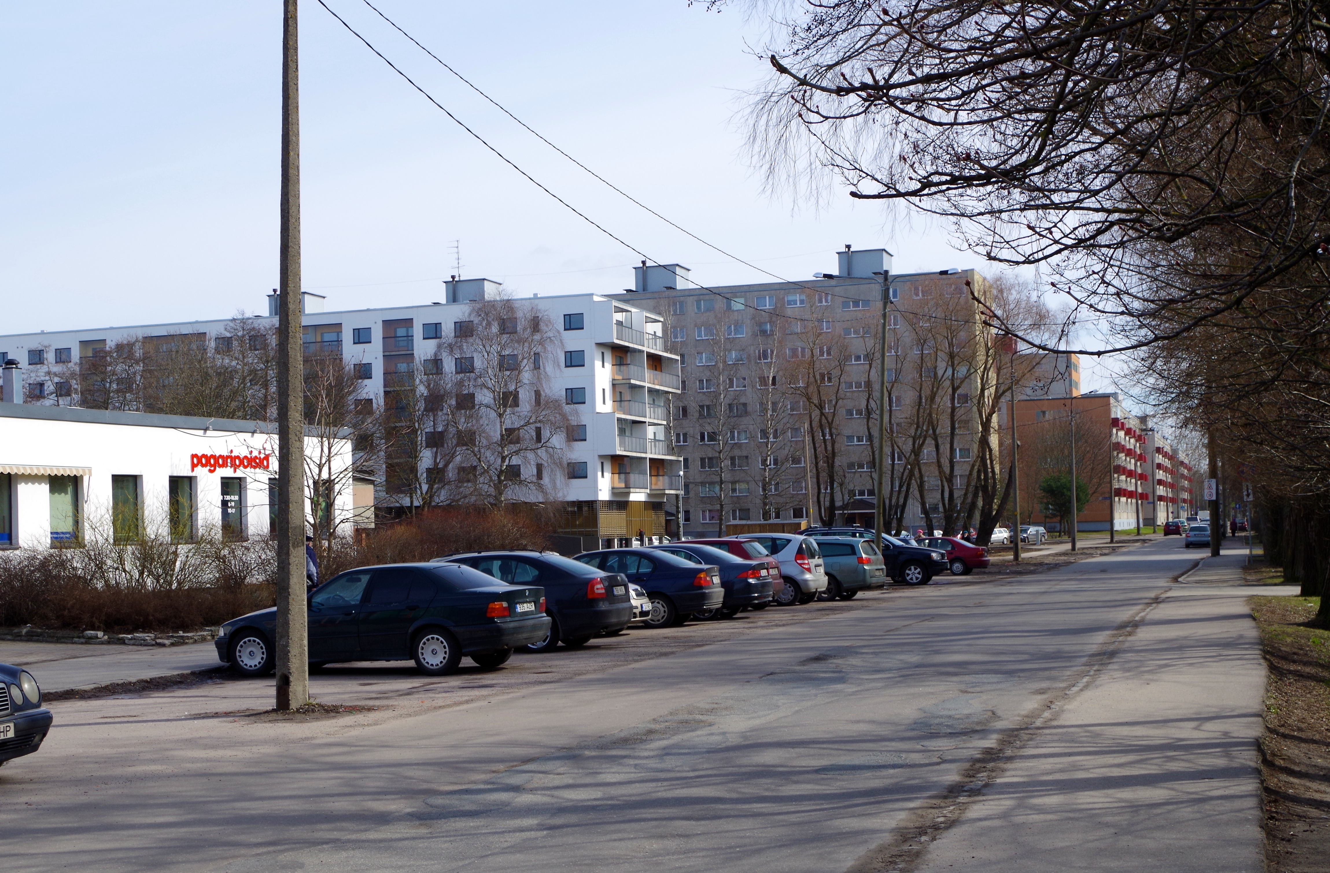 Aprillikuine vaade Kuldnoka tänavale Mustamäe teelt.